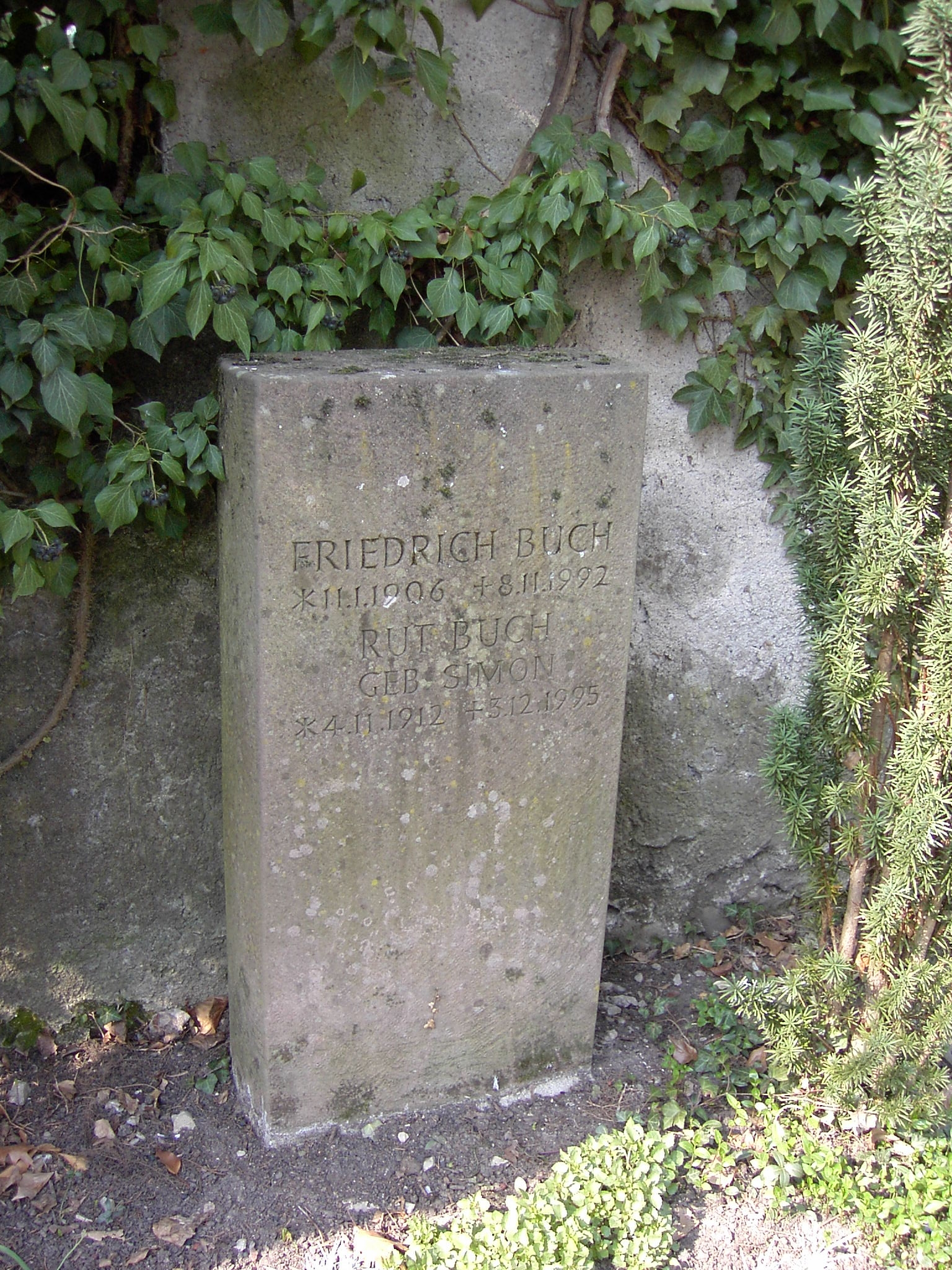 Grabstein von Friedrich Buch auf dem Friedhof in Staufen im Breisgau